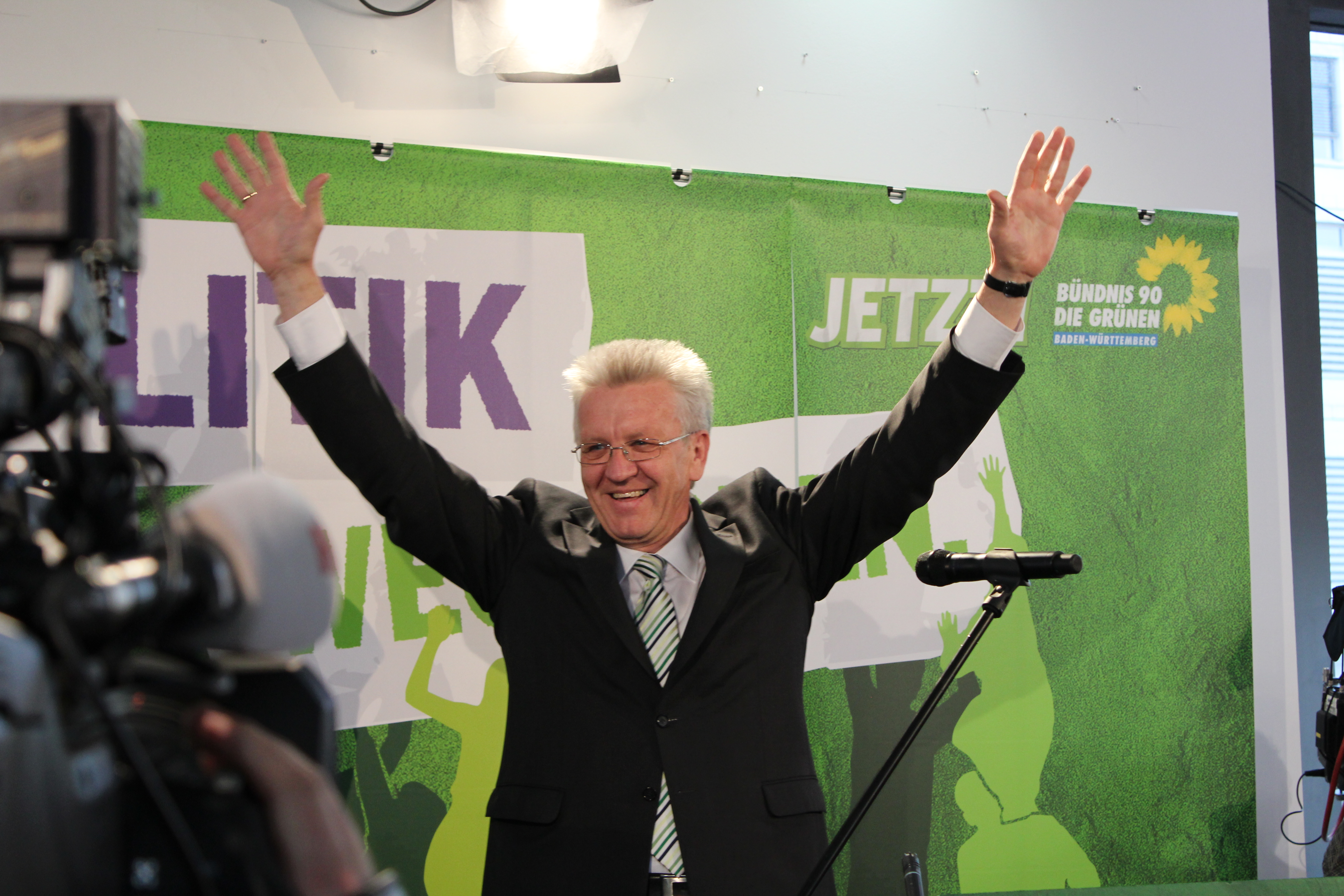 Wahlparty, Landtagswahlen Baden-Württemberg 2011